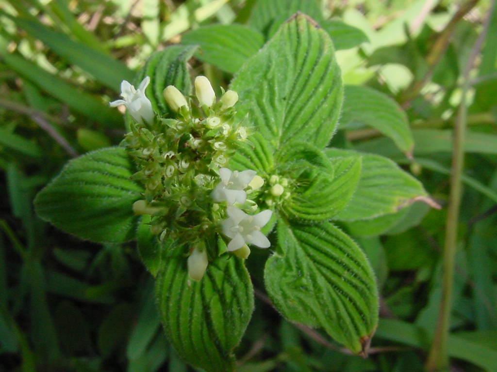 Diodia radula - RUBIACEAE - Praia do Mo�ambique - Florian�polis - SC - Brasil